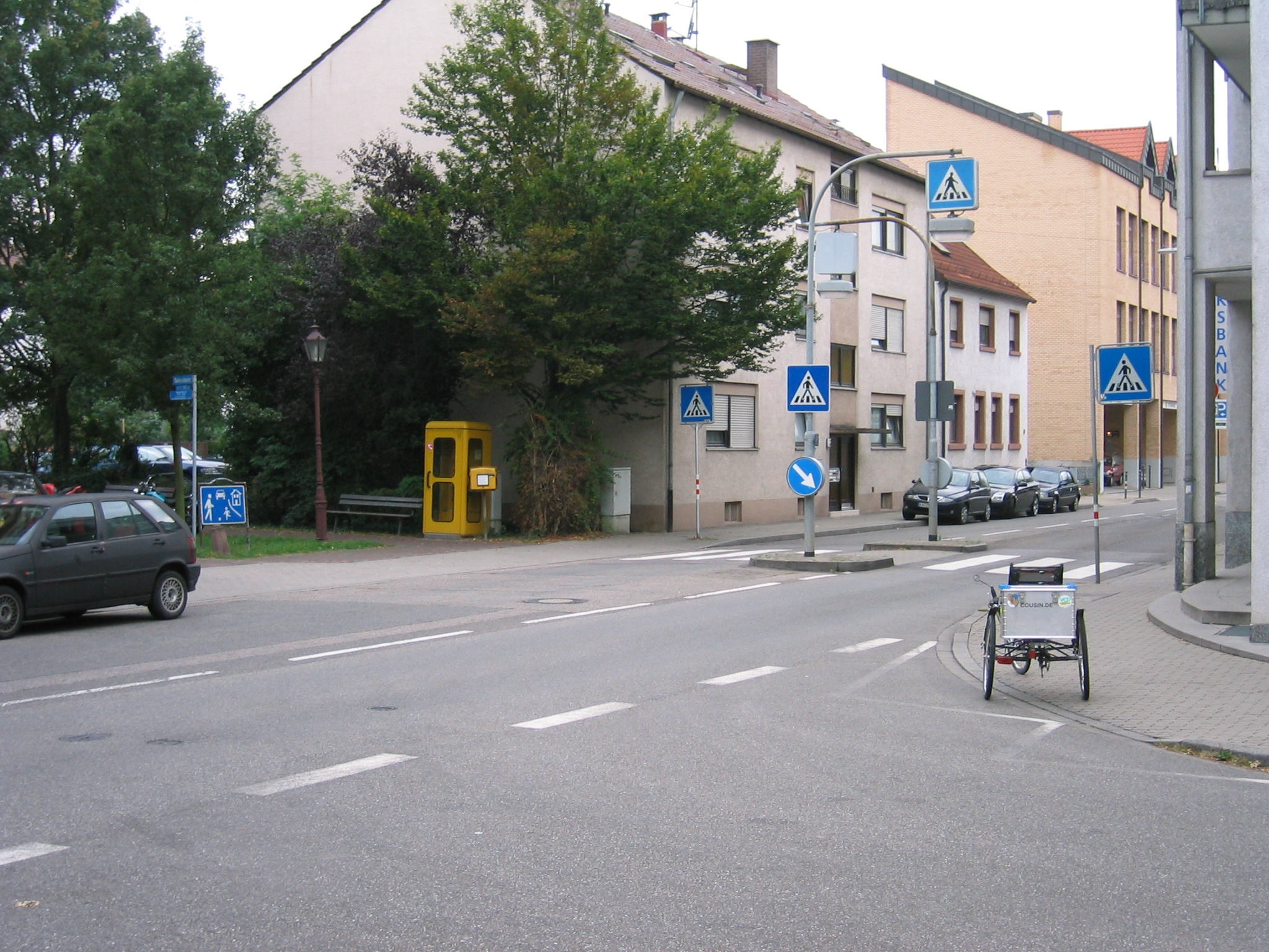 Zebrastreifen in "freier Landschaft", keine Vorrechte für Radler